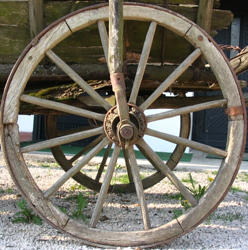 shot in villány